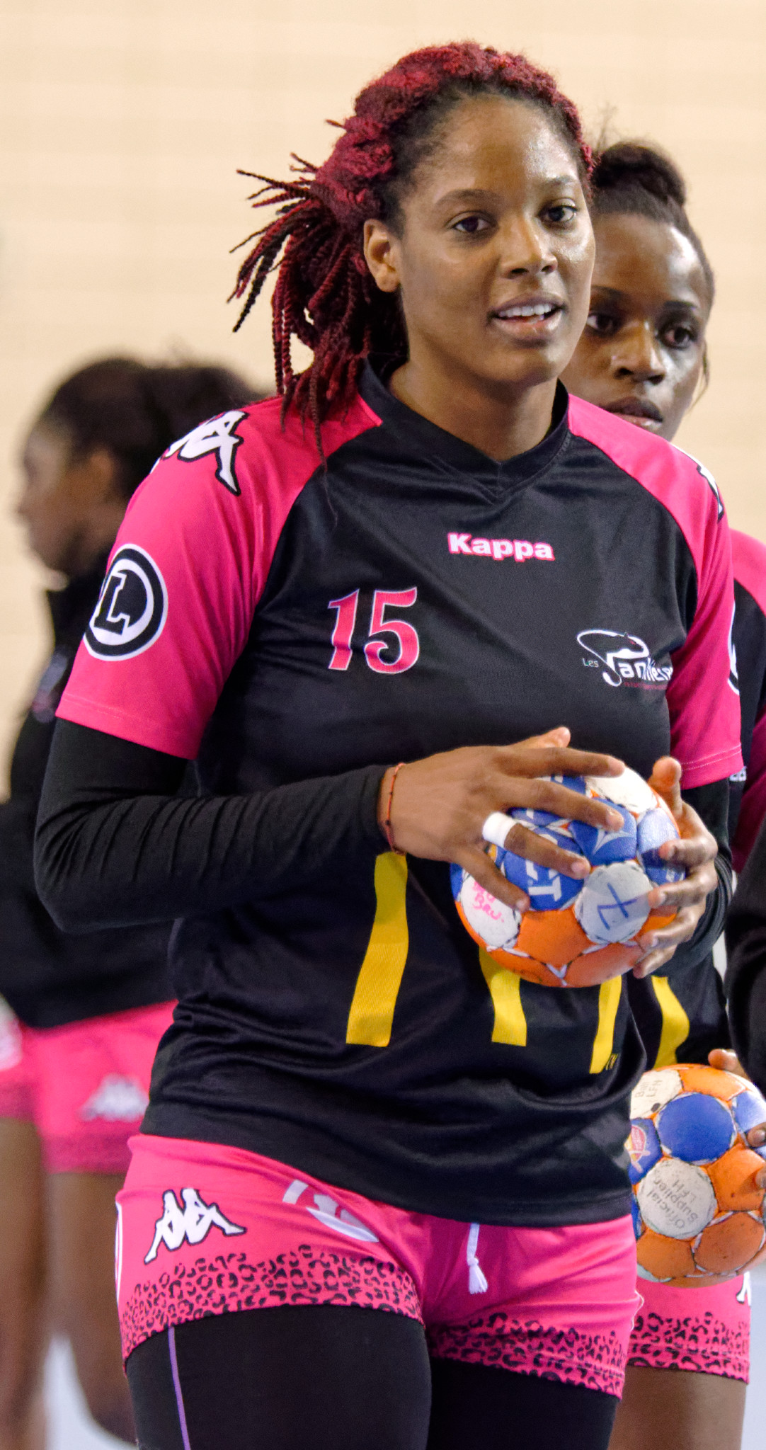 Demie-finale aller de playoff entre Issy Paris Hand et Fleury. A Issy Les Moulineaux, le 22 avril 2016.